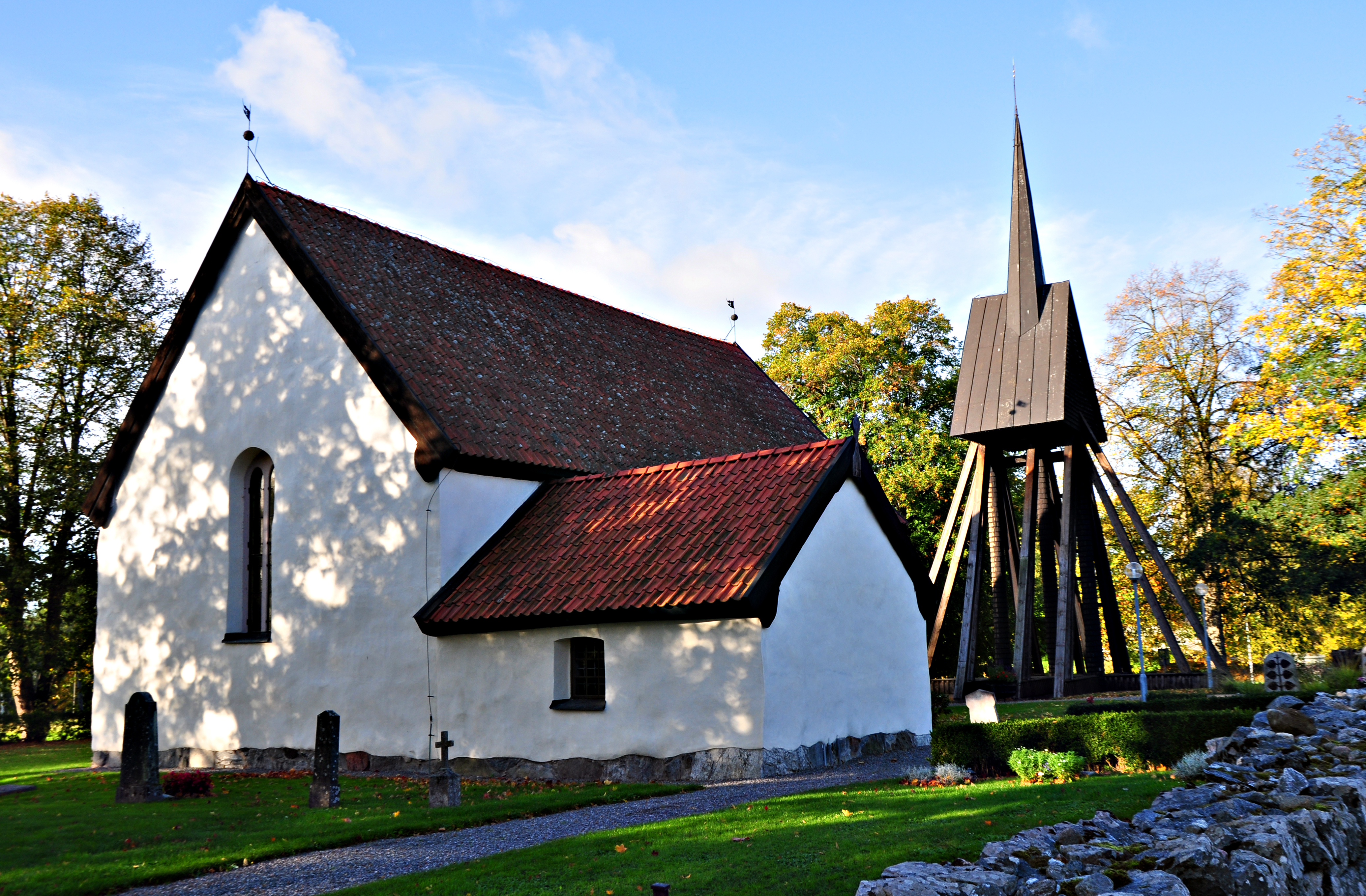 Vrena kyrka, Nyköping.